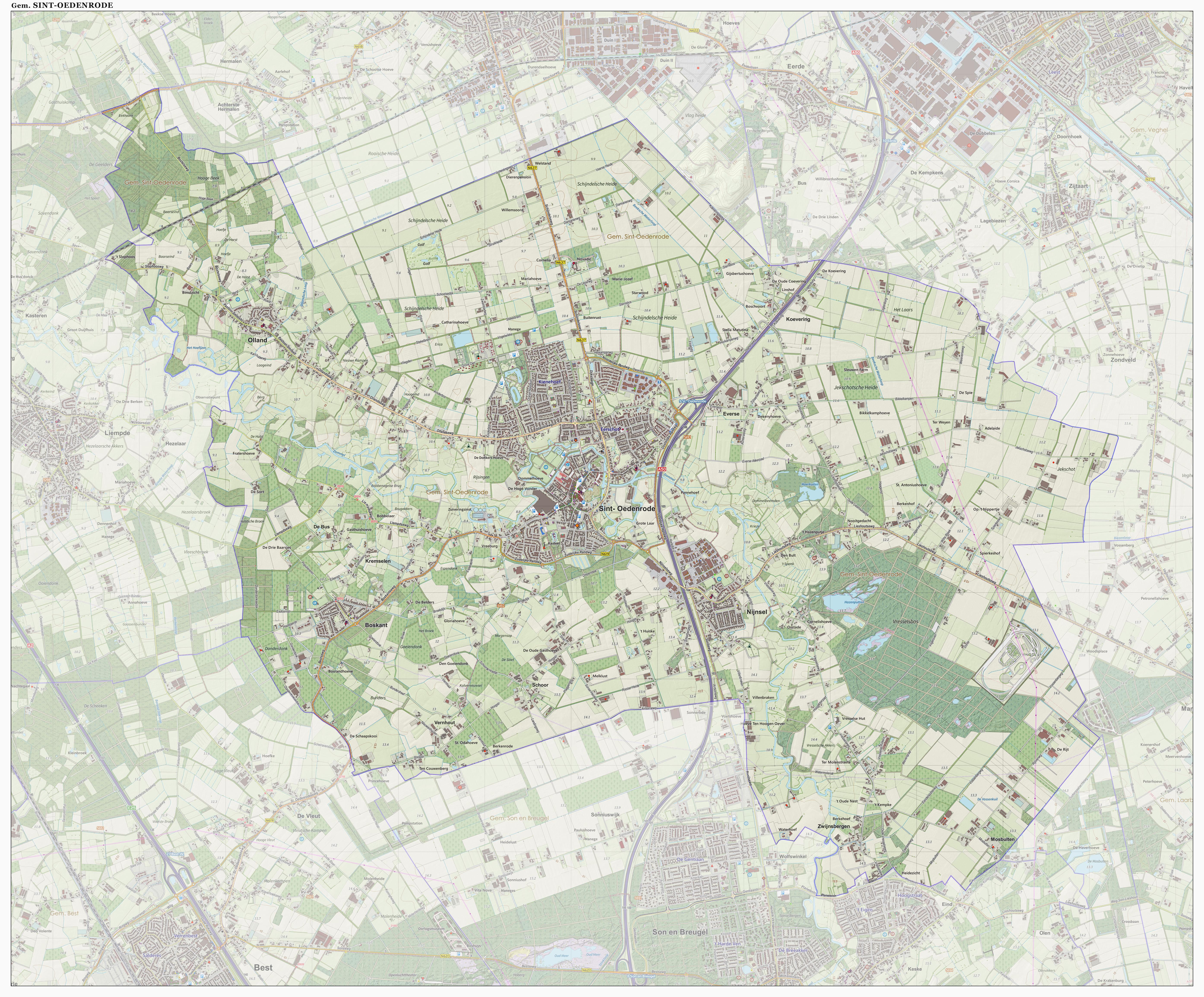 Topografische gemeentekaart. Resolutie: 400 pixels/km. Kaartbeeld samengesteld uit de open geodata van de Top10NL en Top25namen (Kadaster), Creative Commons-BY licentie. Gebouwvlakken uit open geodata BAG extract. Wegen uit de OpenStreetMap, OpenStreetMap community. Reliëfschaduw uit de Actuele Hoogtekaart AHN2. Samenstelling en kleurenschema: Jan-Willem van Aalst, met QGIS. Zie ook de Legenda.